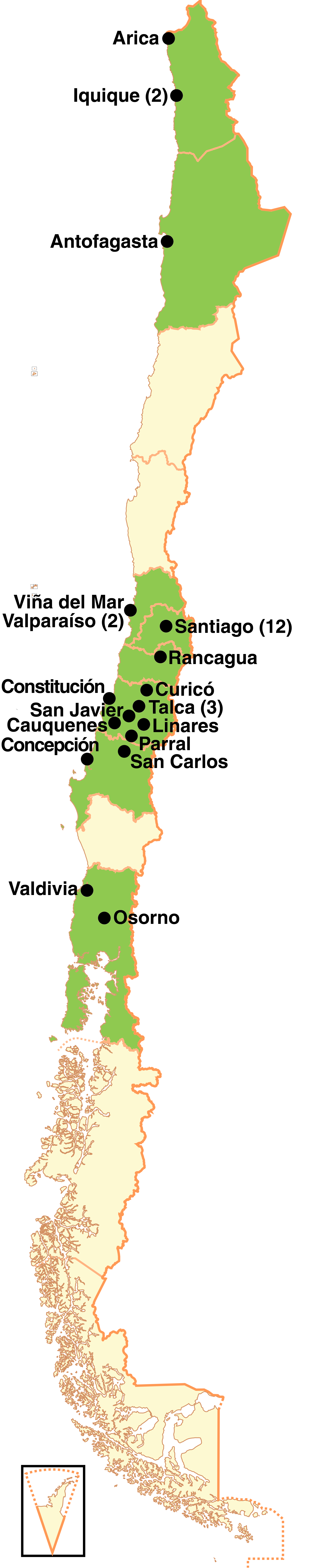 Mapa con las sucursales del Banco de Talca al momento de su liquidación (abril de 1982).